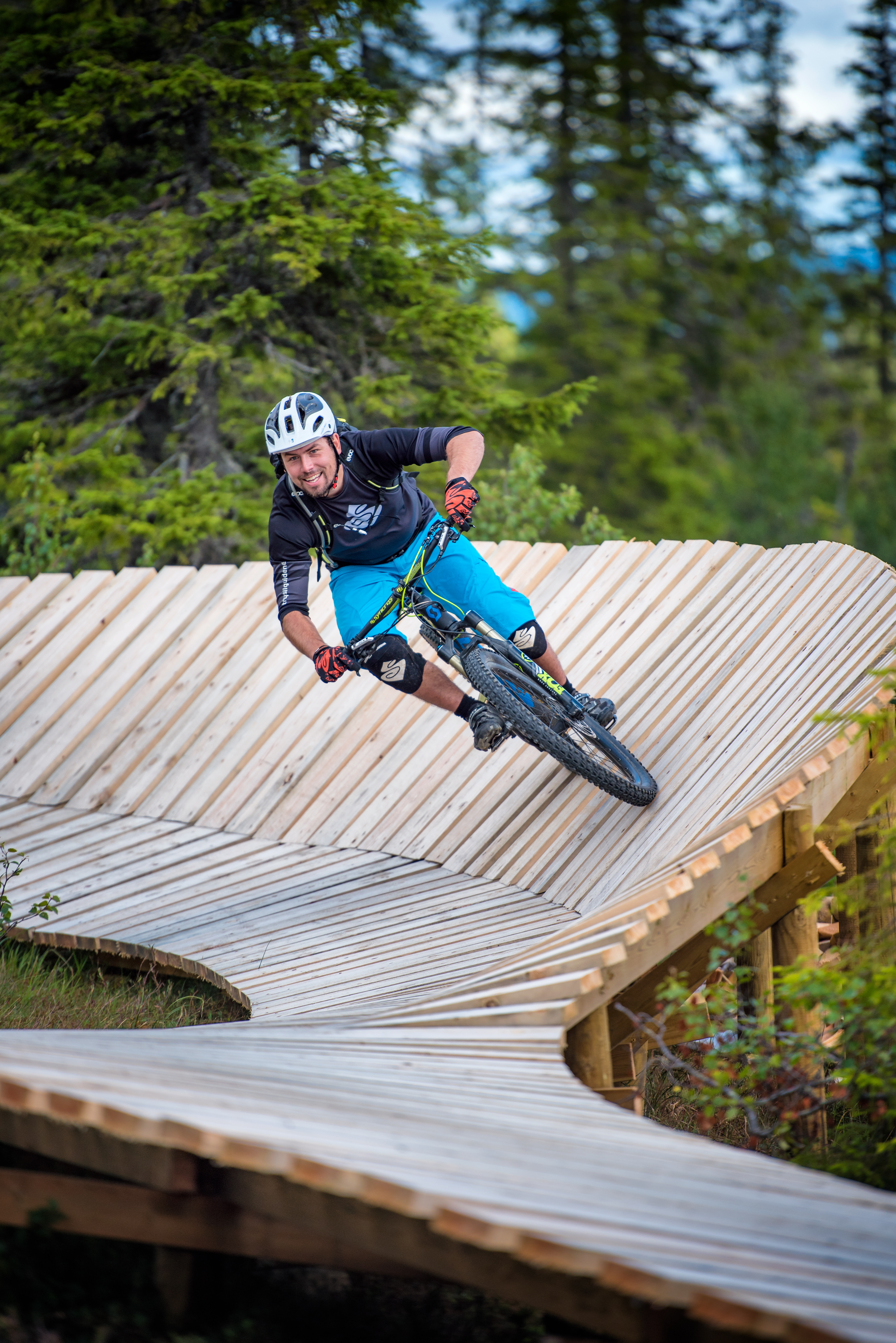 Magic Moose er en ny, familievennlig flytsti i Trysilfjellet. Foto: Hans Martin Nysæter / Trysil